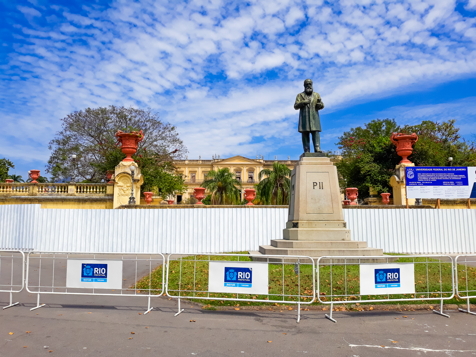 Monumentos RJ